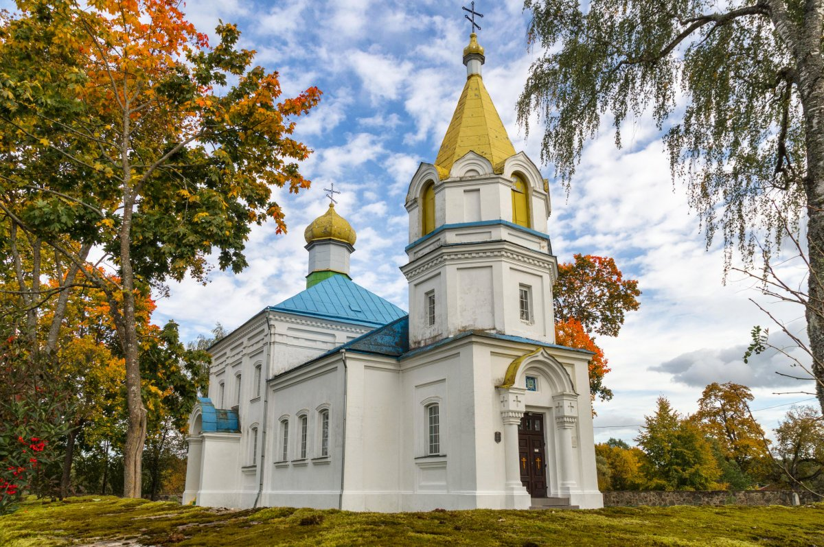 Ручыца. Царква